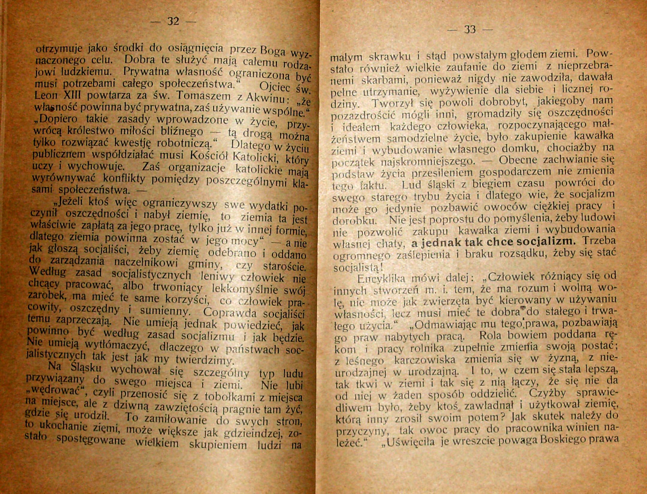 Stanisław Krzyżowski, Rozmyślania w czterdziestą rocznicę encykliki „Rerum novarum”, wydanej 15 maja 1891 r. przez papieża Leona XIII, Pszczyna 1931